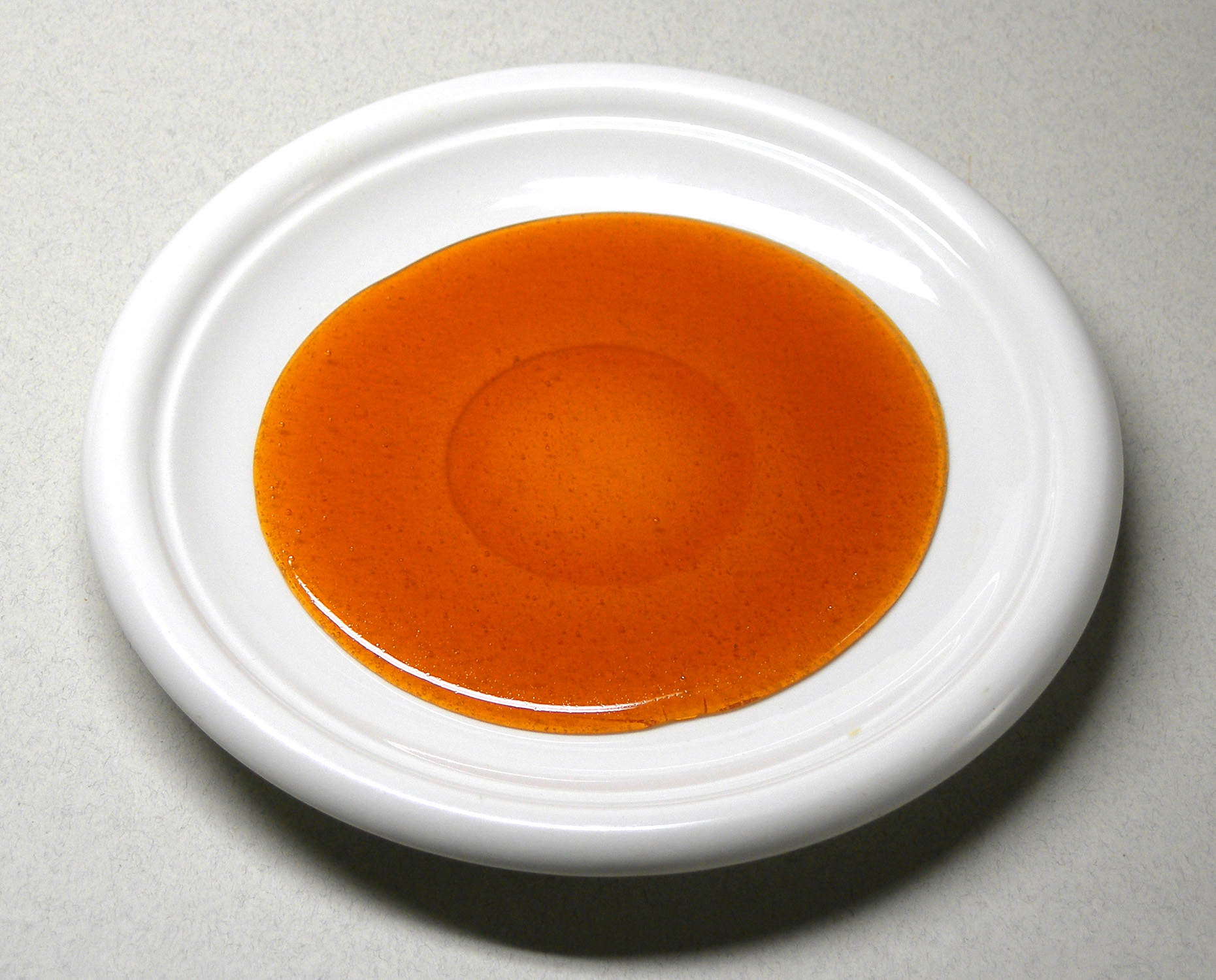 Caramel